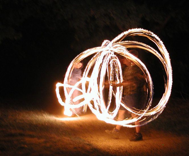 Fireshow